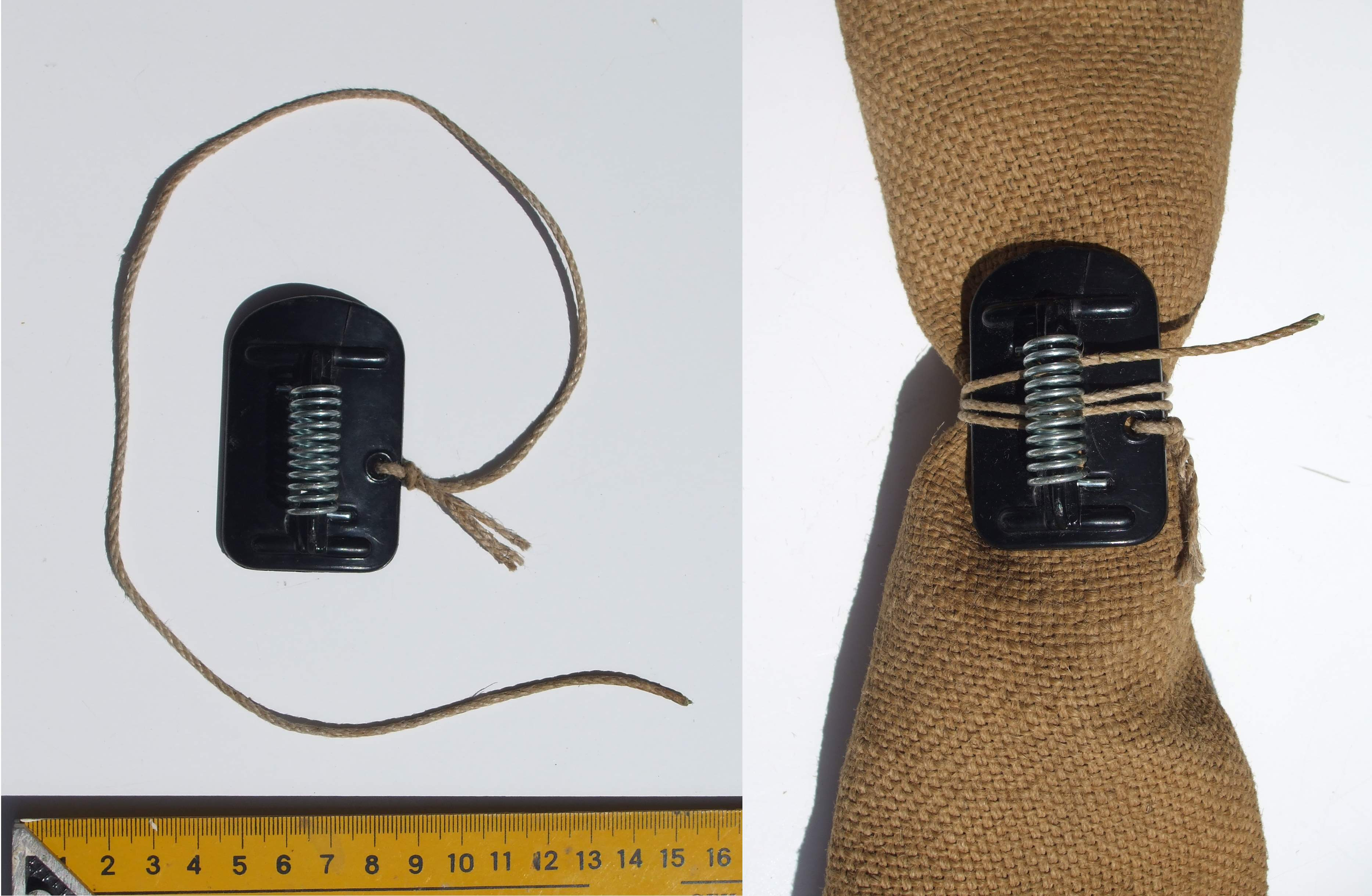 Schnur-Schliesse der Post, an einem alten Sack nachgestellt